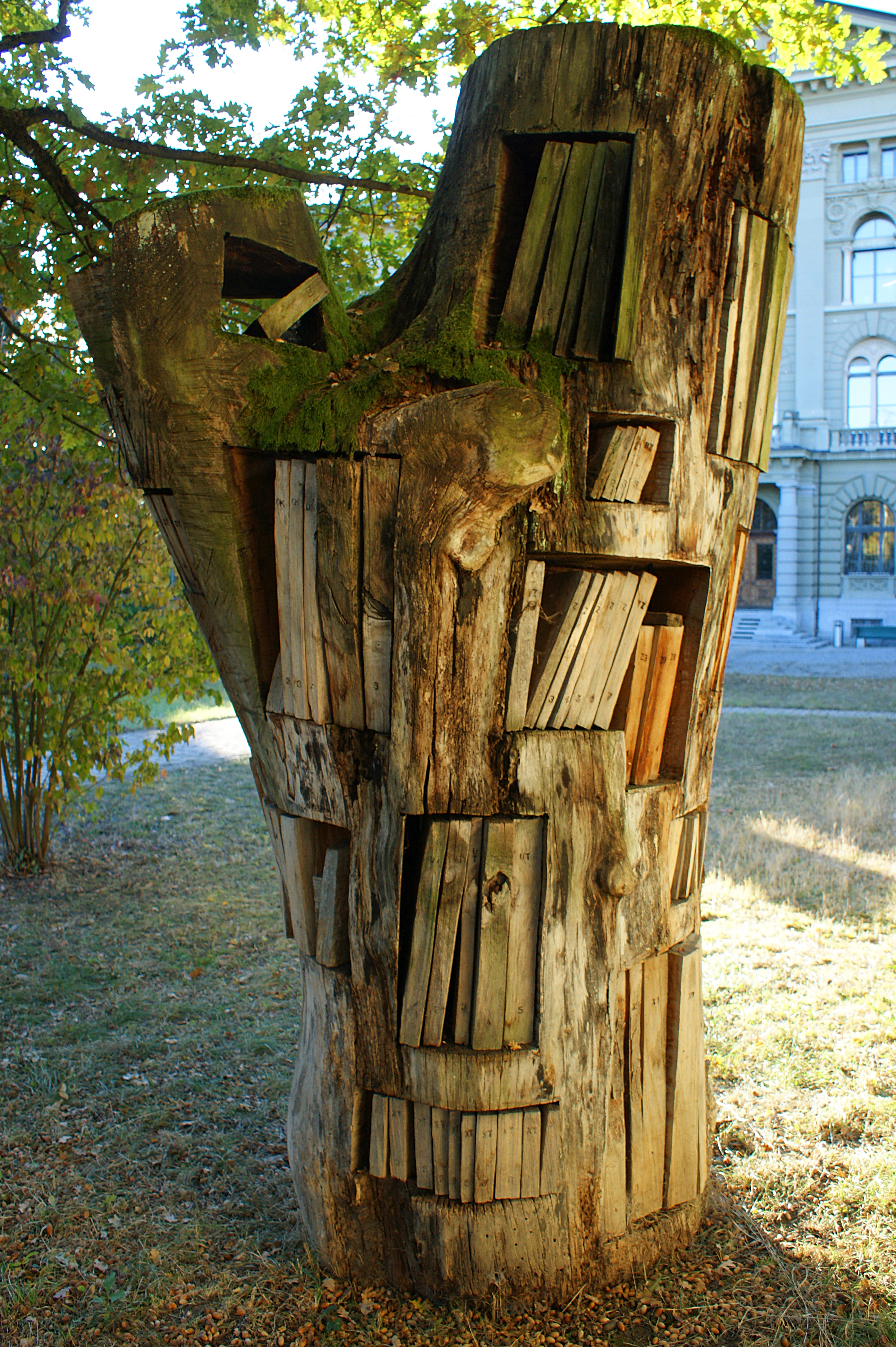 Holzskulptur Öffnung der Archive (Urs-Peter Twellmann 1997⁄98)